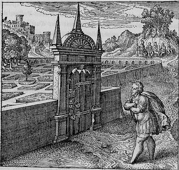 Emblem 27